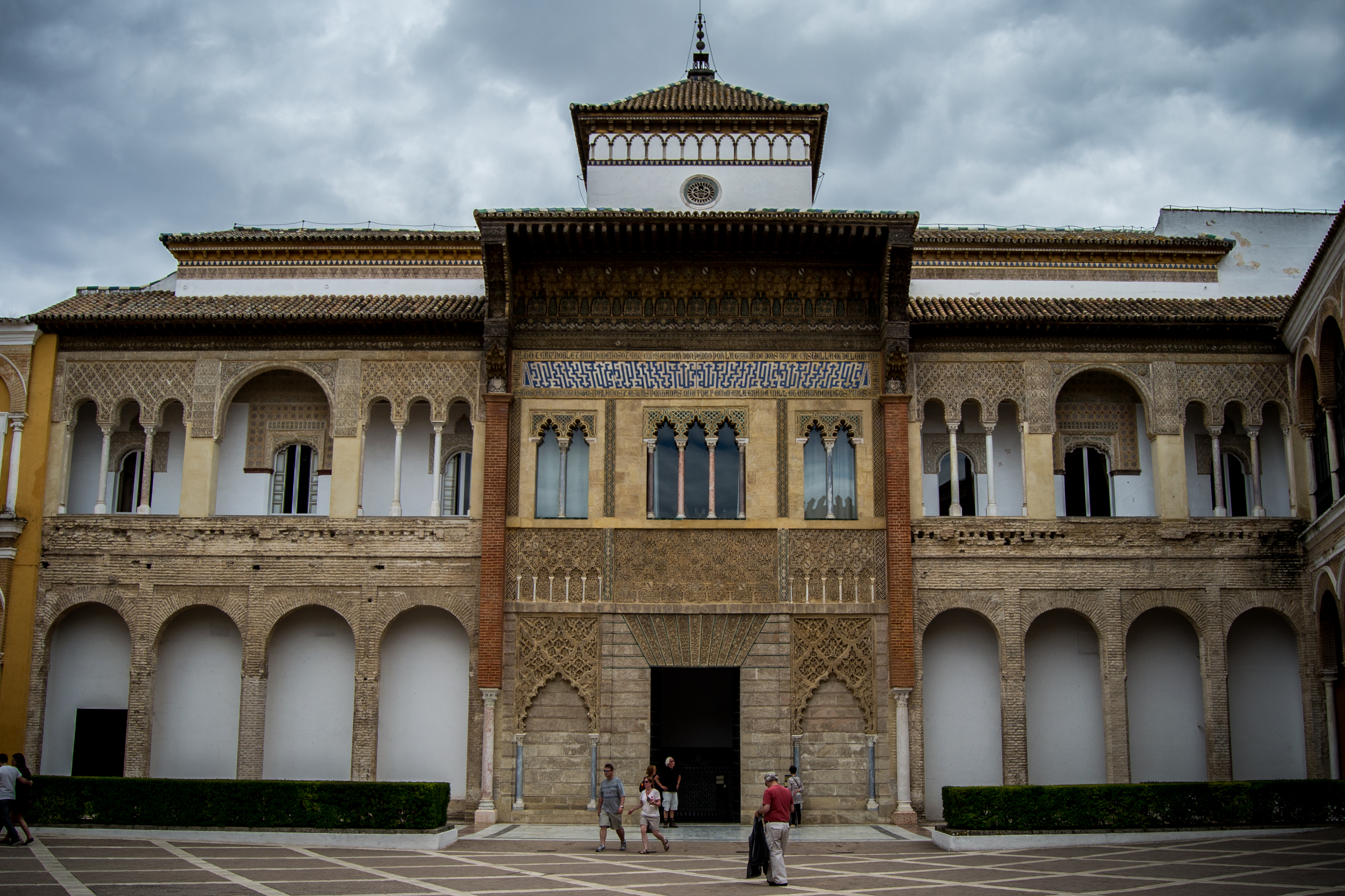 Fachada del Palacio del rey don Pedro, en el Real Alcázar de Sevilla.